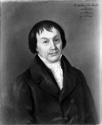 Johann Christian Friedrich Steudel; Gemälde der Professorengalerie der Eberhard Karls Universität Tübingen. Bezeichnung: „Dr. Joh.Christ.Frid.Steudel / ord. Prof. theol. / gnb. 25 Oct. 1779. / gnst. 24. Oct. 1837.“ (o.r.) “A.St. / 1858“ (Sign. u.r.) „J.Ch.F. Steudel / Theol.F.+1837“ (Rahmenschild) Material: Öl auf Leinwand, Bild: 74 cm x 60 cm, Rahmen: 86 cm x 72,2 cm